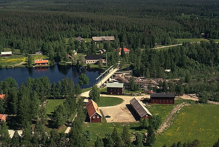 Motiv: Gideåbruk Nyckelord: Flygbilder, Riksintressen Kategori: Bruksmiljö .